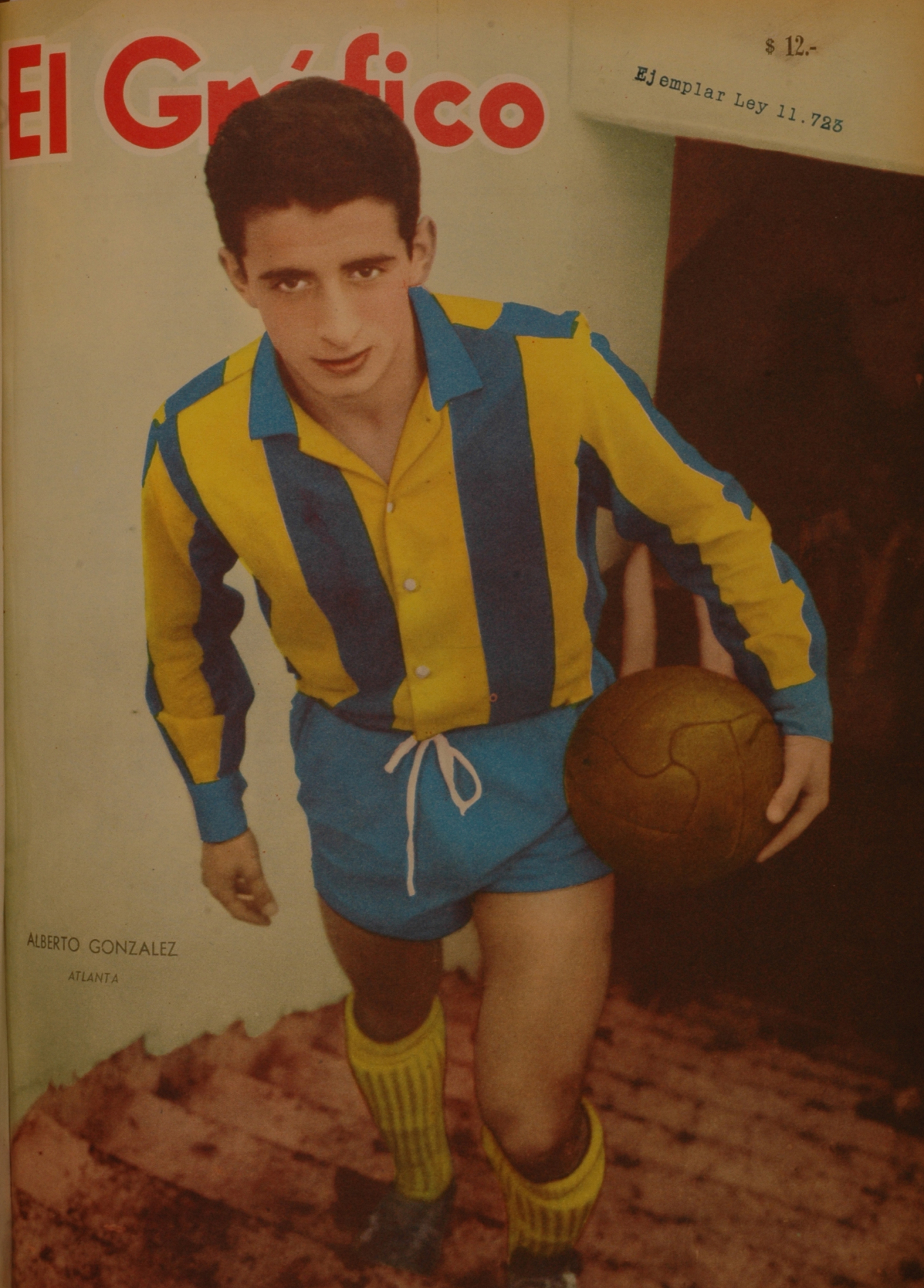 El Grafico del 12 de Julio de 1961. Edicion 2180